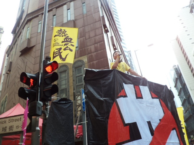 中文（香港）: 熱血公民在2014年7月1日灣仔街站進行發言